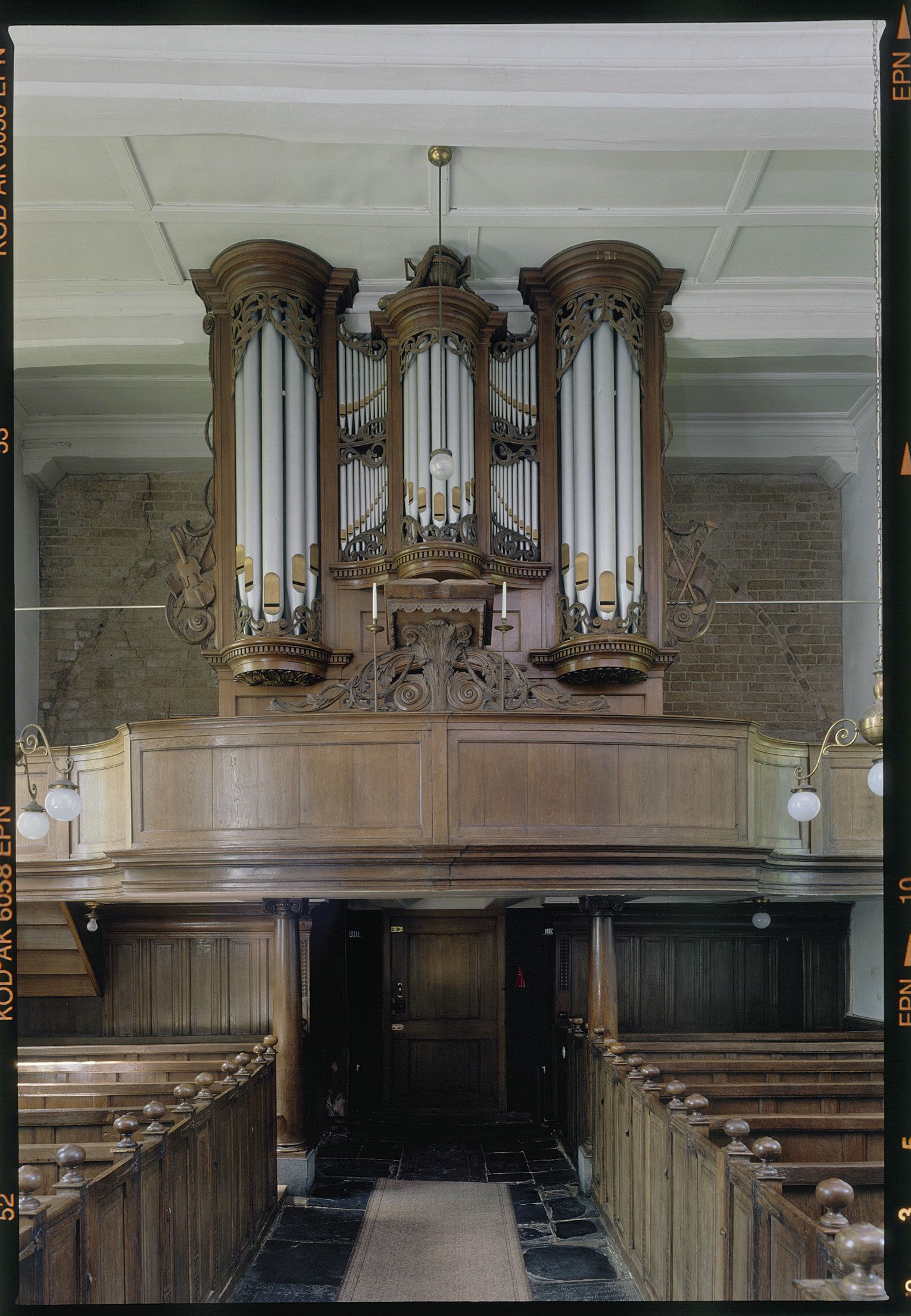 Nederlands Hervormde Kerk: Interieur, aanzicht orgel, orgelnummer 1767 (opmerking: Gefotografeerd voor Het Historische Orgel in Nederland 1790-1818)